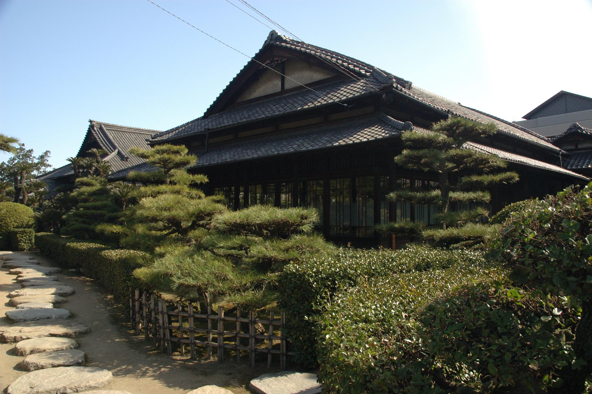 the Hiunkaku